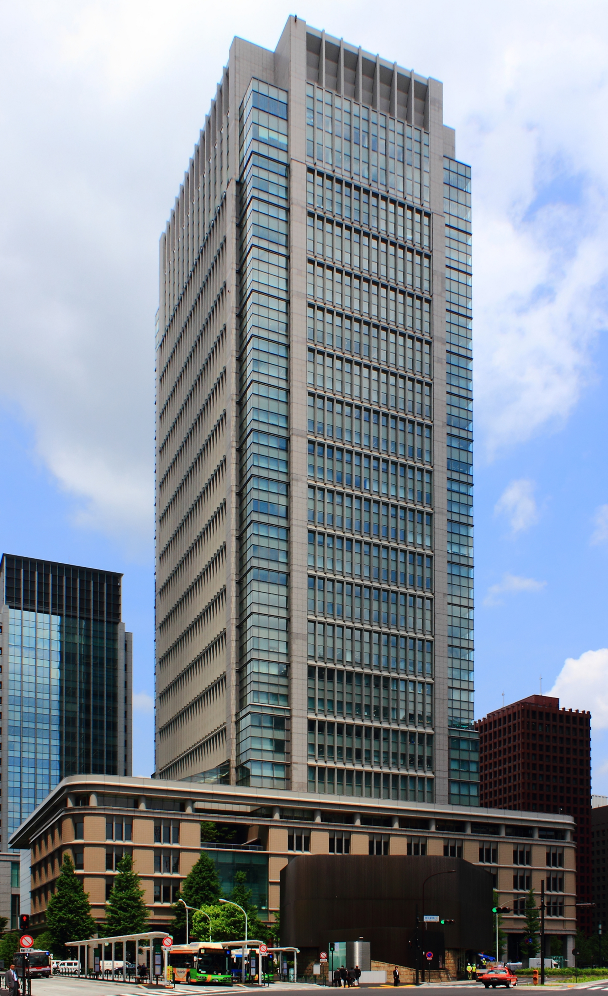 丸の内ビルディング（東京都千代田区）